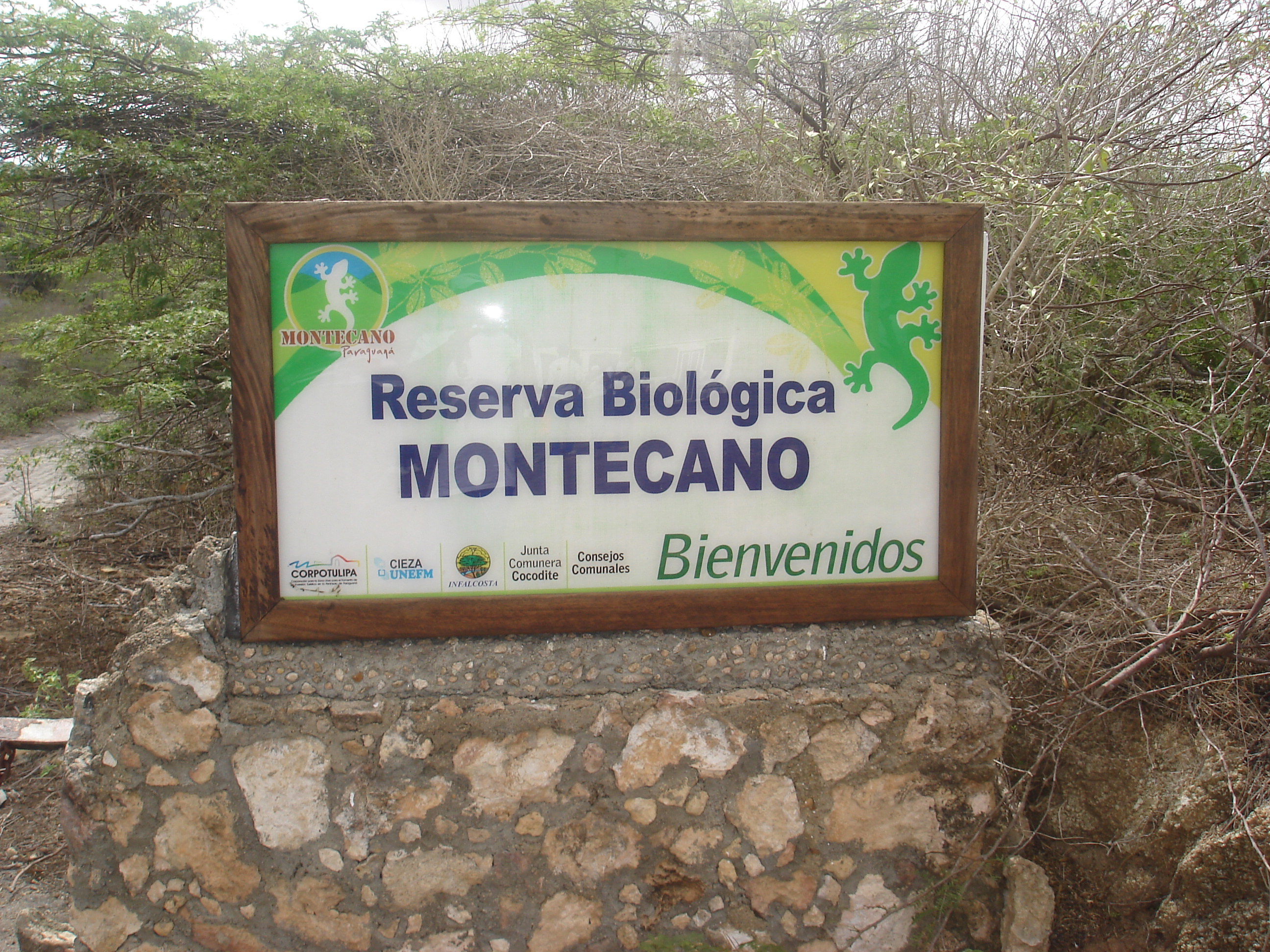 San José de Cocodite es un pueblo perteneciente a la península de Paraguaná.